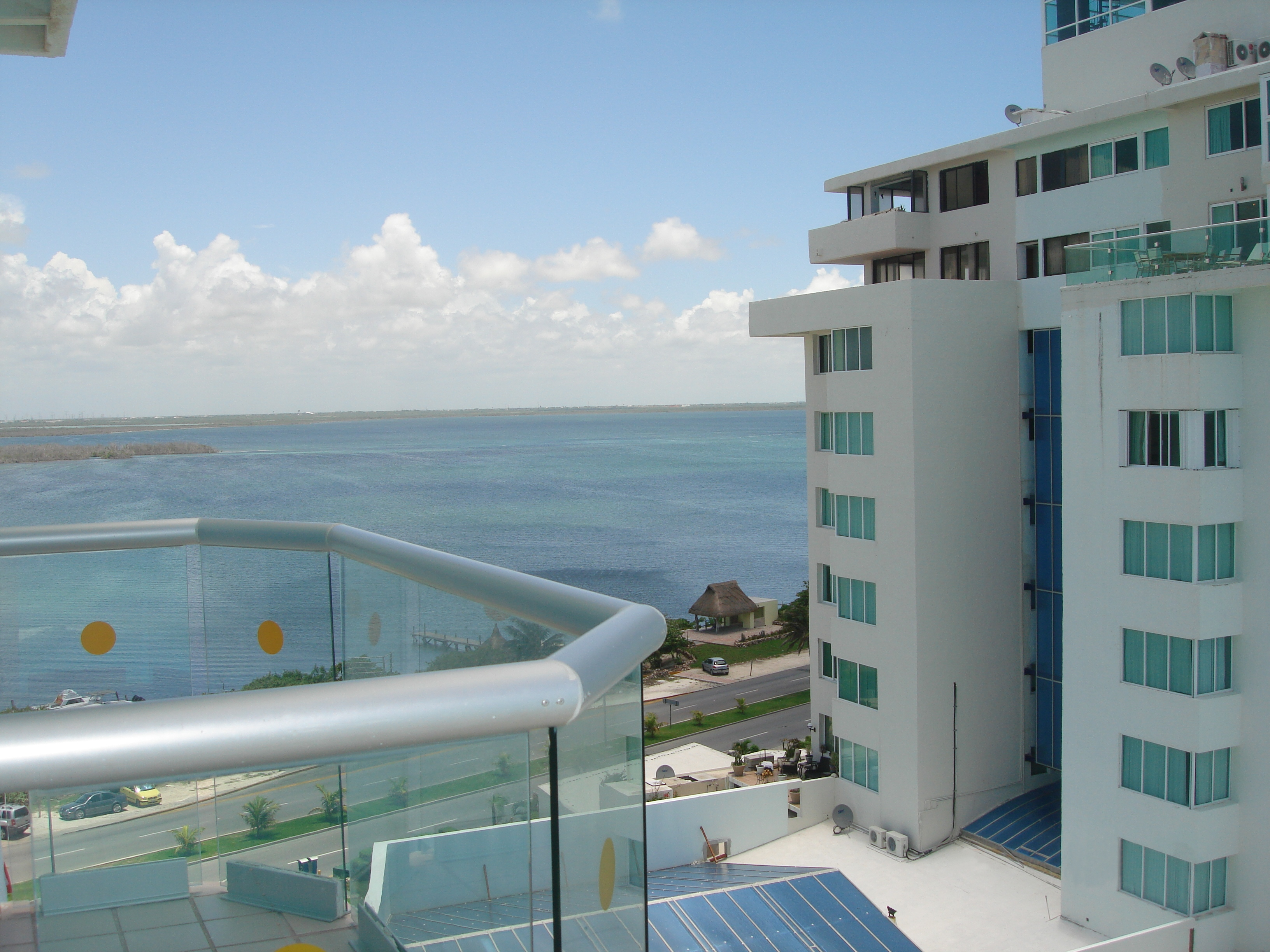 CANCUN - Mexico (Hotel Hotetur Beach Paradise) - Nichupte Laguna